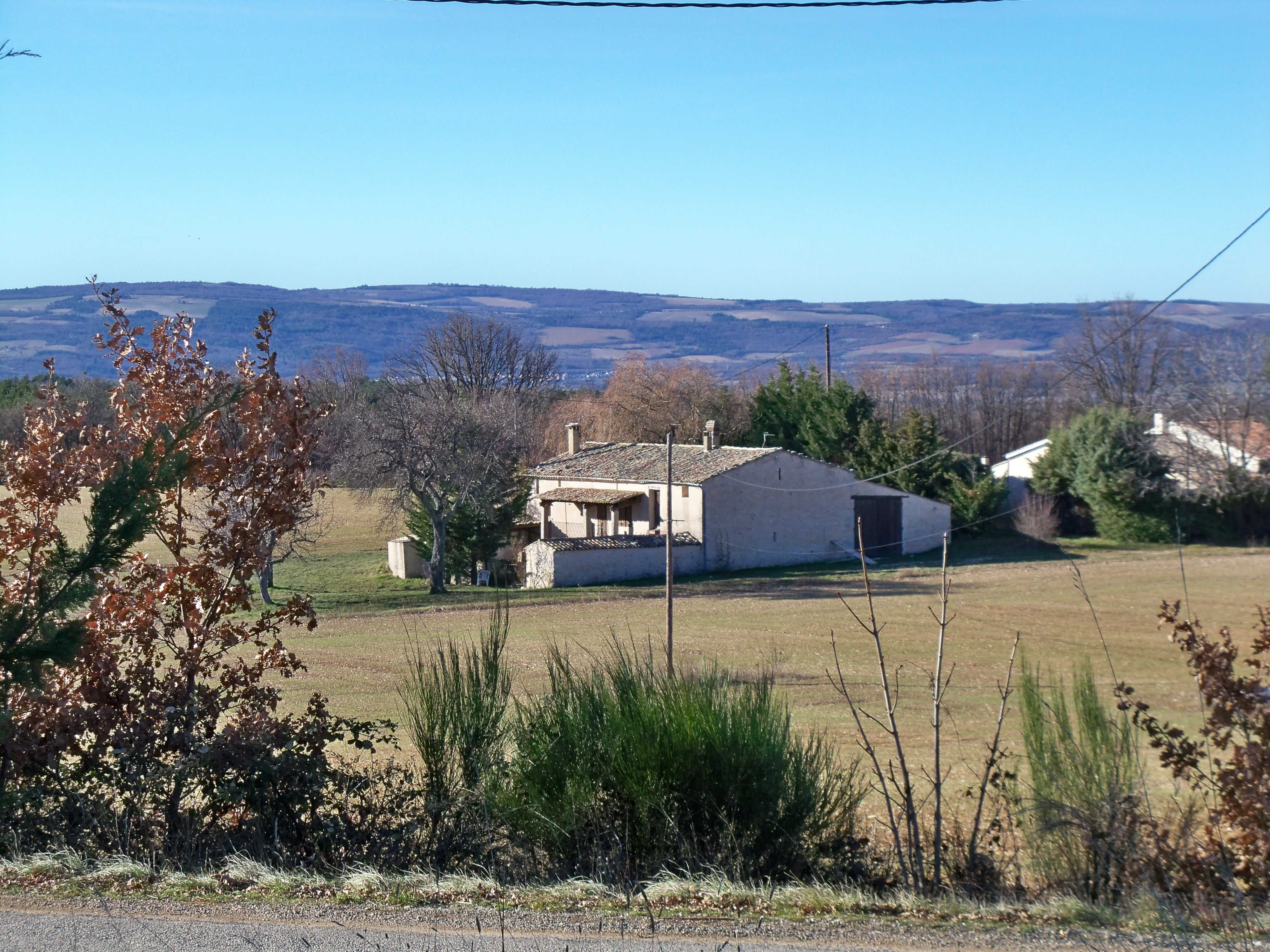 Gîte rural à Revest du Bion (04)